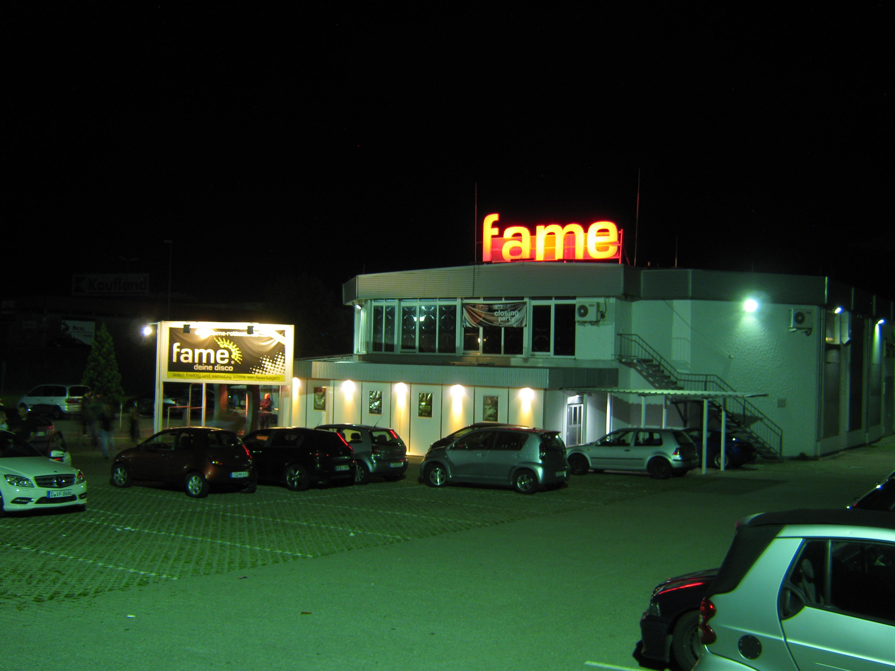 Diskothek "Fame" in Zimmern - Google Maps - Google Earth